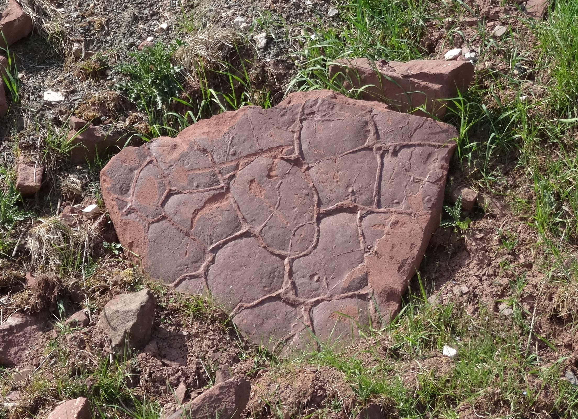 fossiler Abdruck von Trockenrissen mit Füllungen am Bromacker